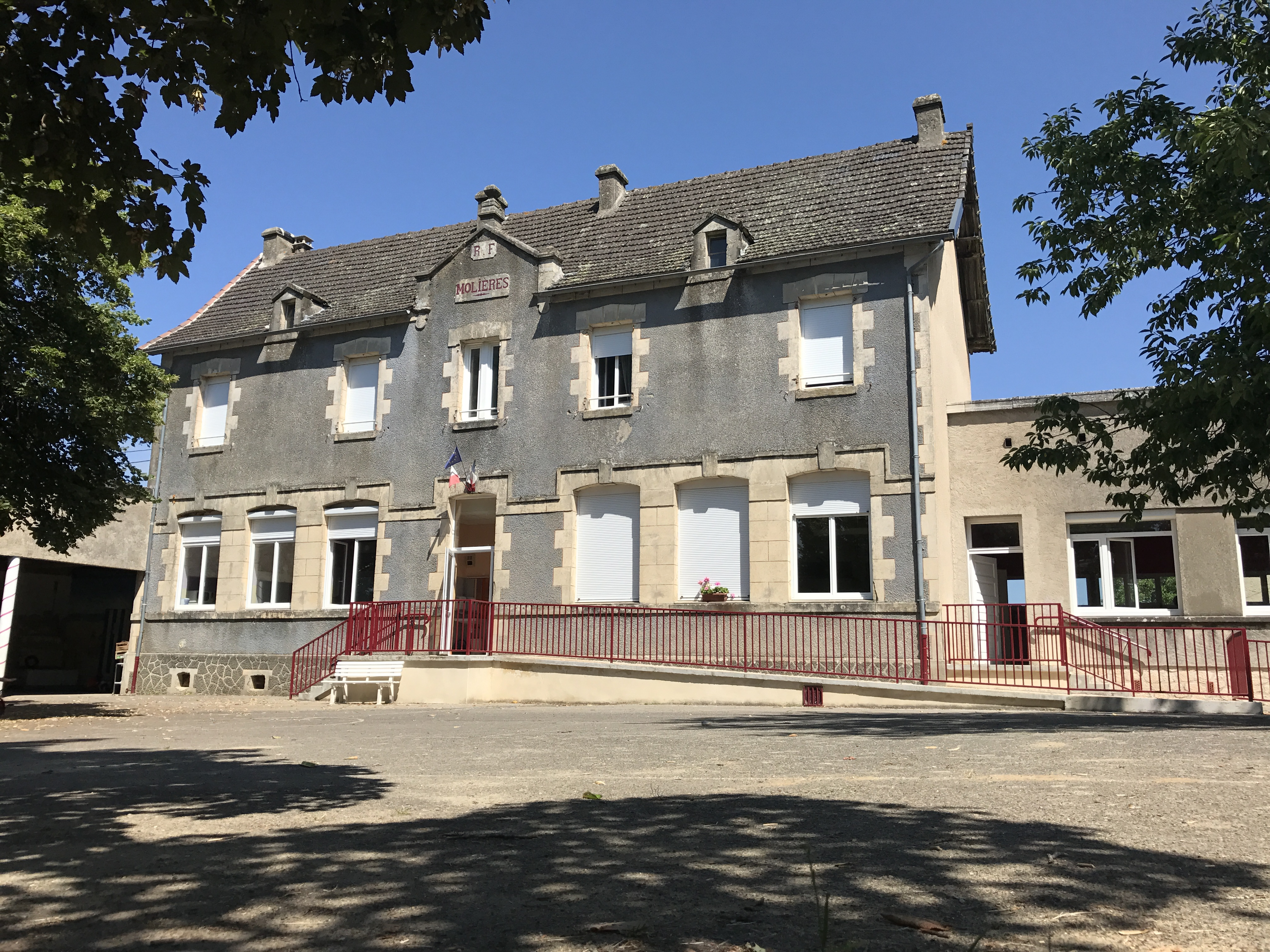 Ecole de Molières, Lot, France